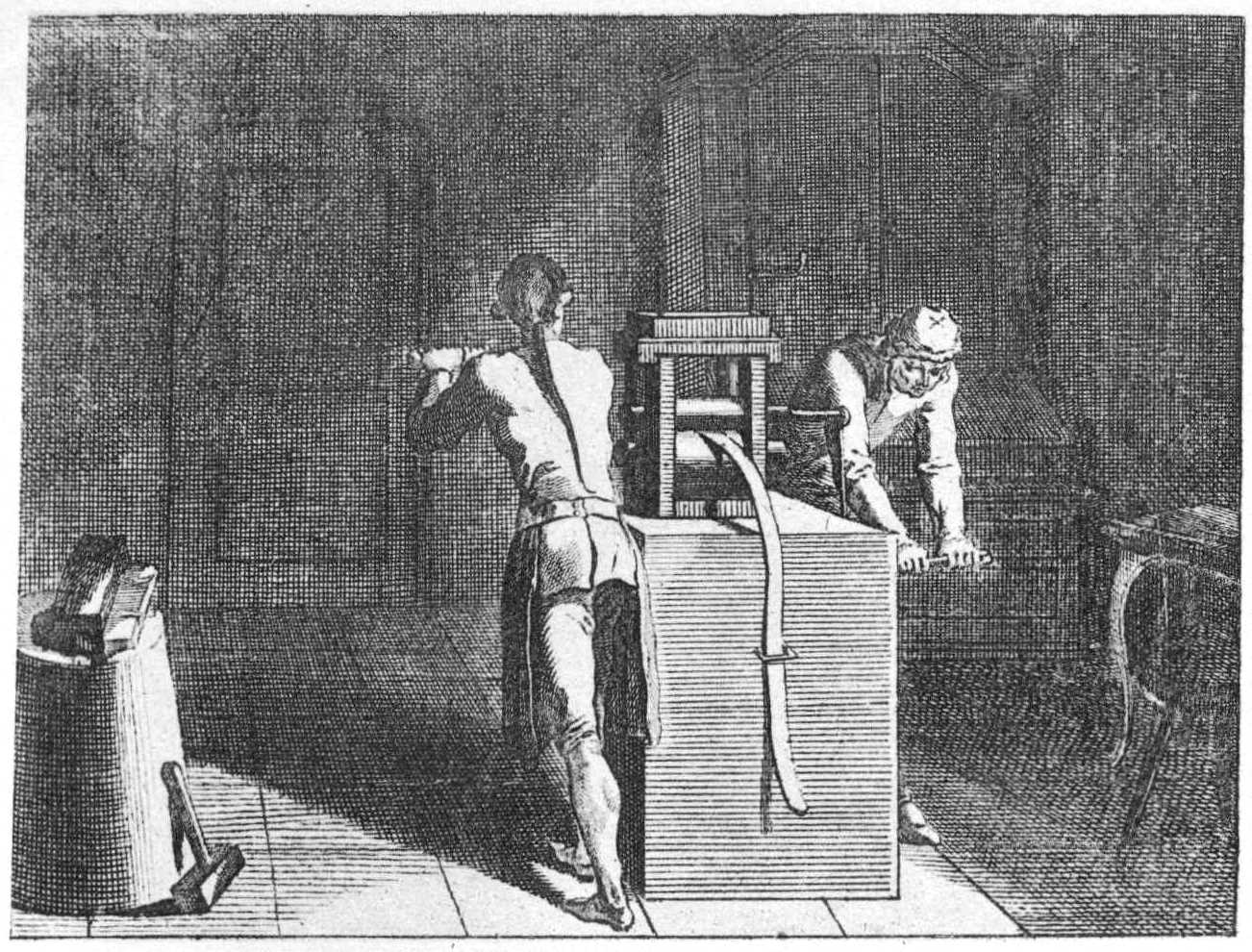 Tab. LVI. Handwerke und Künste. a) Die Metallschläger, welche vermittelst eines Streckwerks durch Drücken, und auf dem Amboße durch Hämmern das Metall ausdehnen. (Beschreibung lt. Quelle)